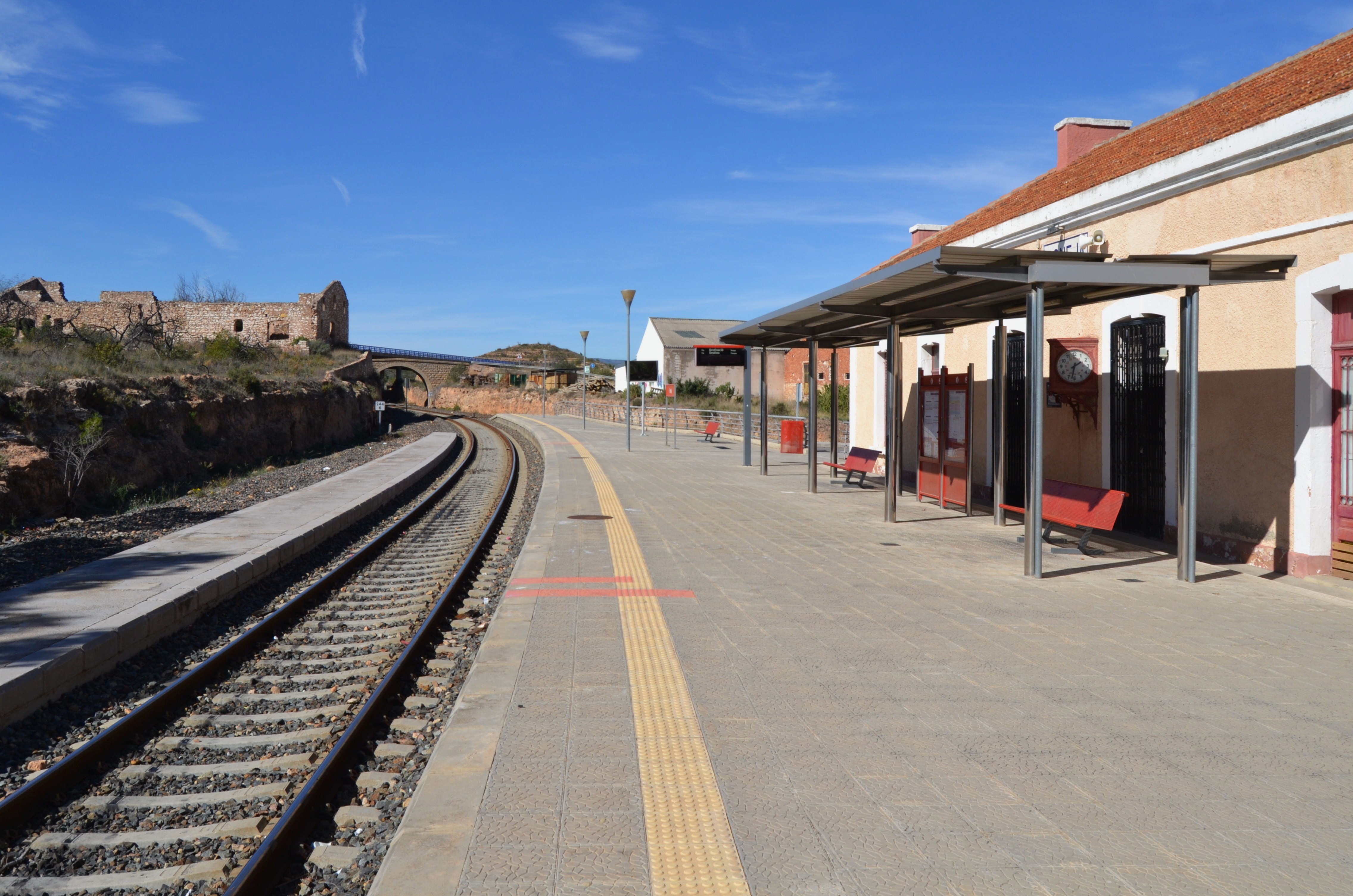 Vies i andana de l'estació de Soneja.